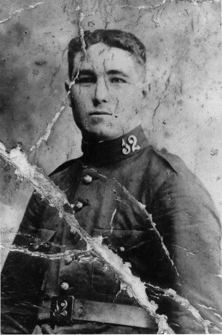 Luis Frade Pazos